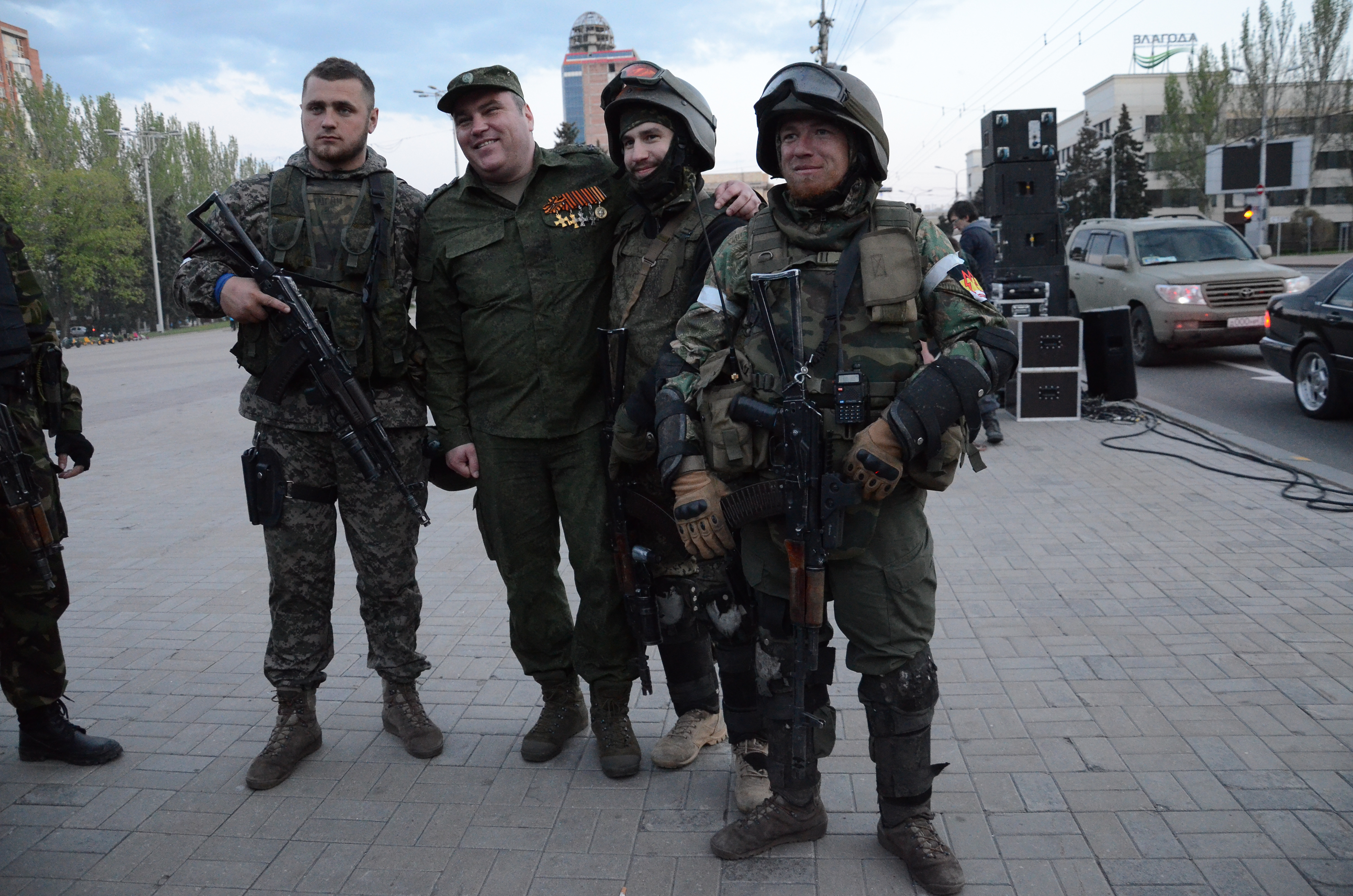 Репетиция парада в честь дня Победы в Донецке